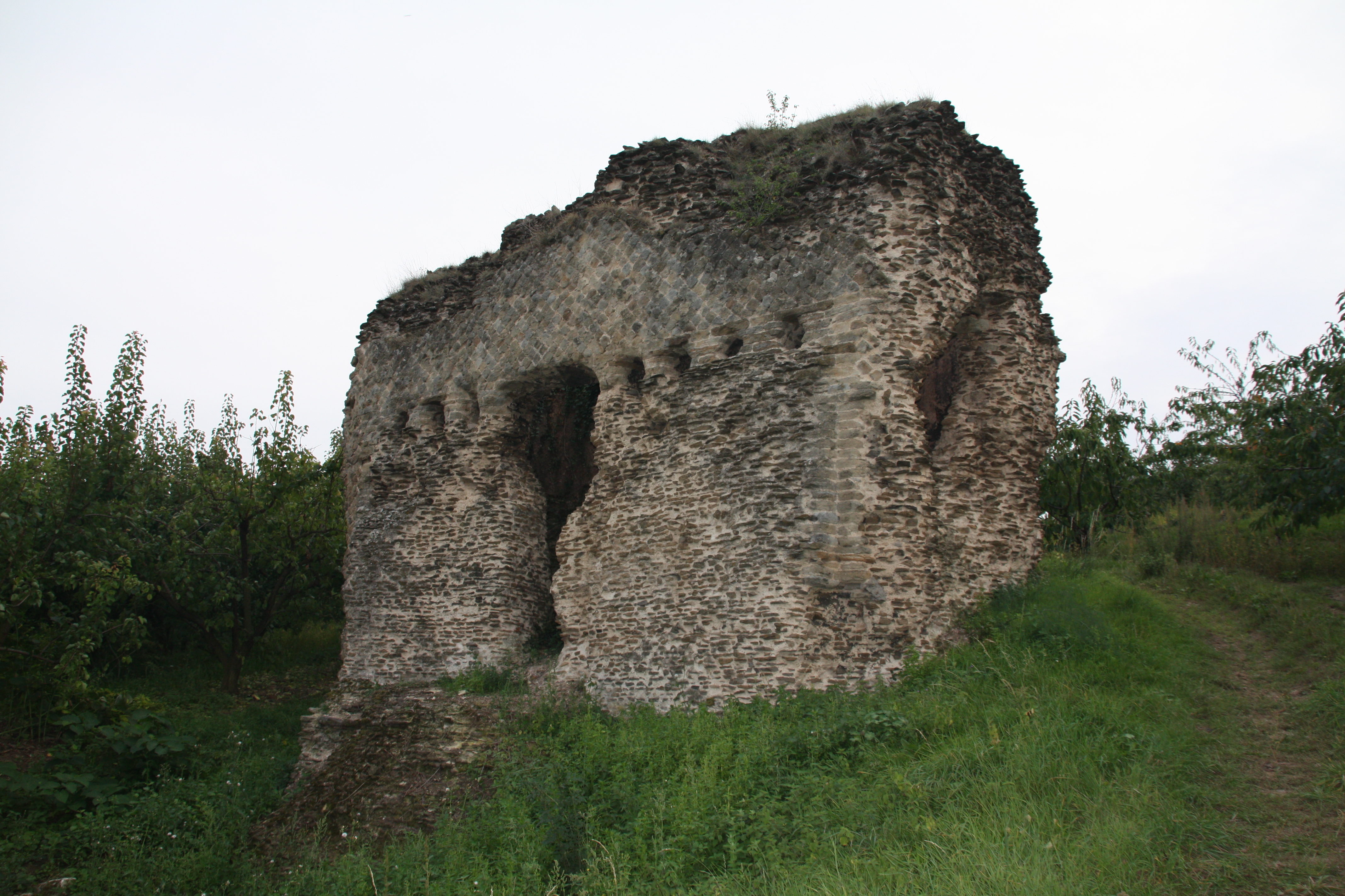 Le réservoir de chasse du Siphon de la Durèze Génilac, Loire, France - Photo prise avec l'aimable autorisation des propriétaires. .